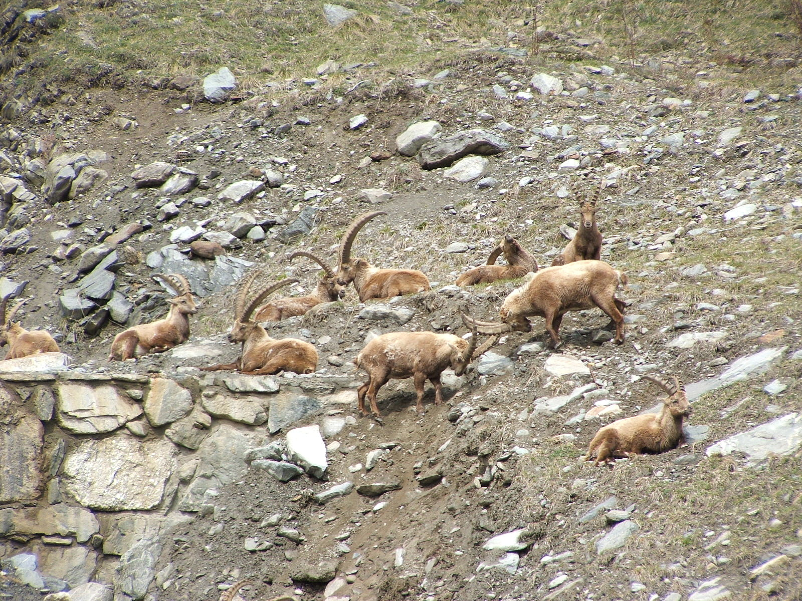 Stambecchi nei pressi di Rhêmes-Notre-Dame, Valle d'Aosta